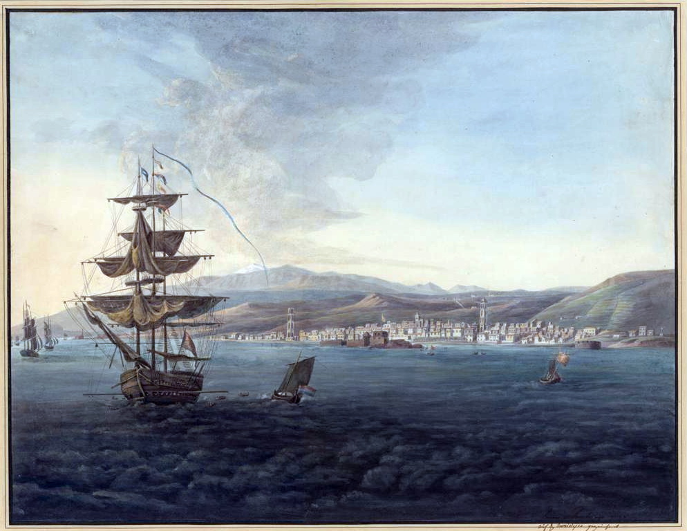 Aquarel van Santa Cruz de Tenerife met de vulkaan Teide op de achtergrond, geschilderd door Louise van Panhuys in 1815, waarschijnlijk tijdens of na een zeereis van of naar Suriname, waar ze als echtgenote van een plantagehouder vijf jaar woonde (1811-1816). Collectie Universiteitsbibliotheek Frankfurt am Main.